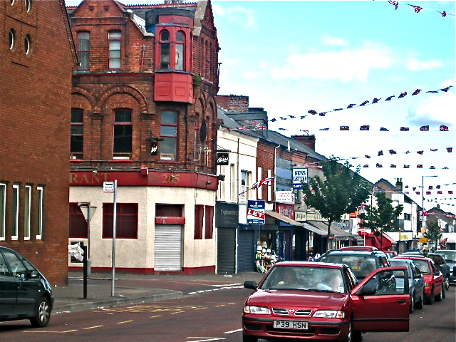 Berlin Arms, Shankill Road, Belfast.